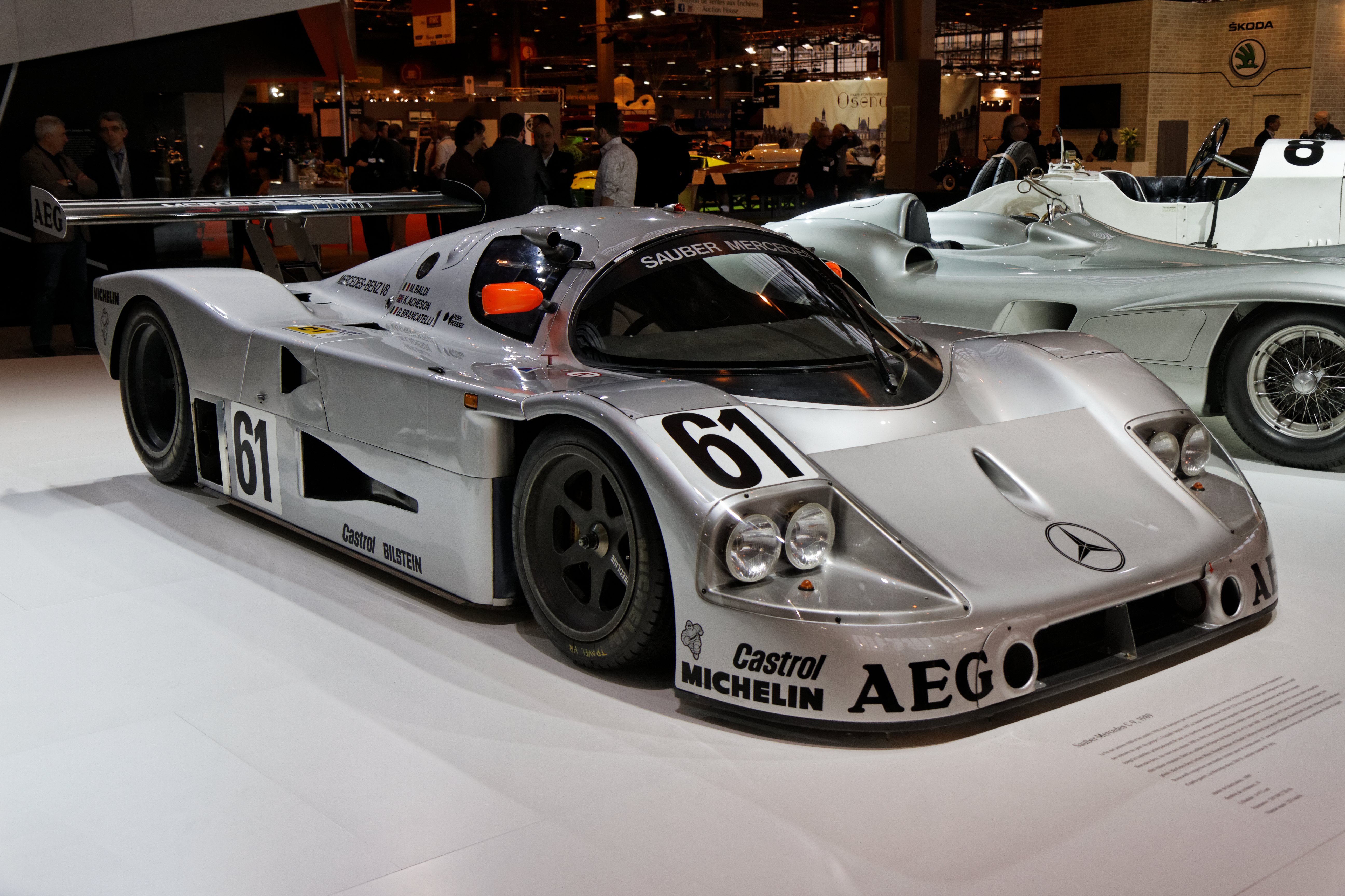 Une Sauber-Mercedes C9 exposée lors du salon Retromobile 2014.